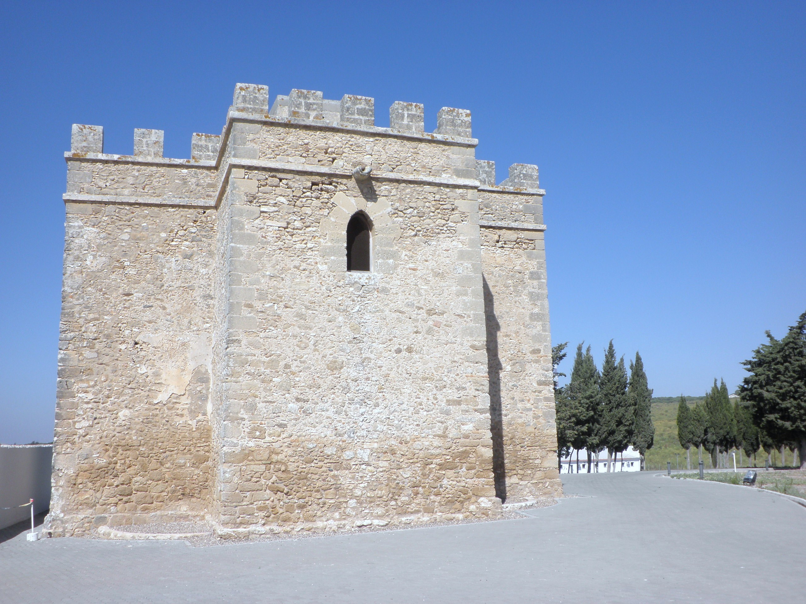 Yacimiento arqueológico de Doña Blanca, El Puerto de Santa María, España.